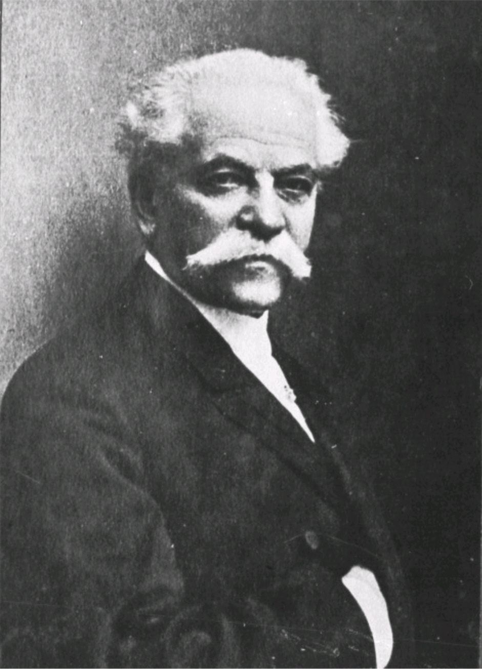 Heinrich Caro (* 13. Februar 1834 in Posen; † 11. September 1910 in Dresden)